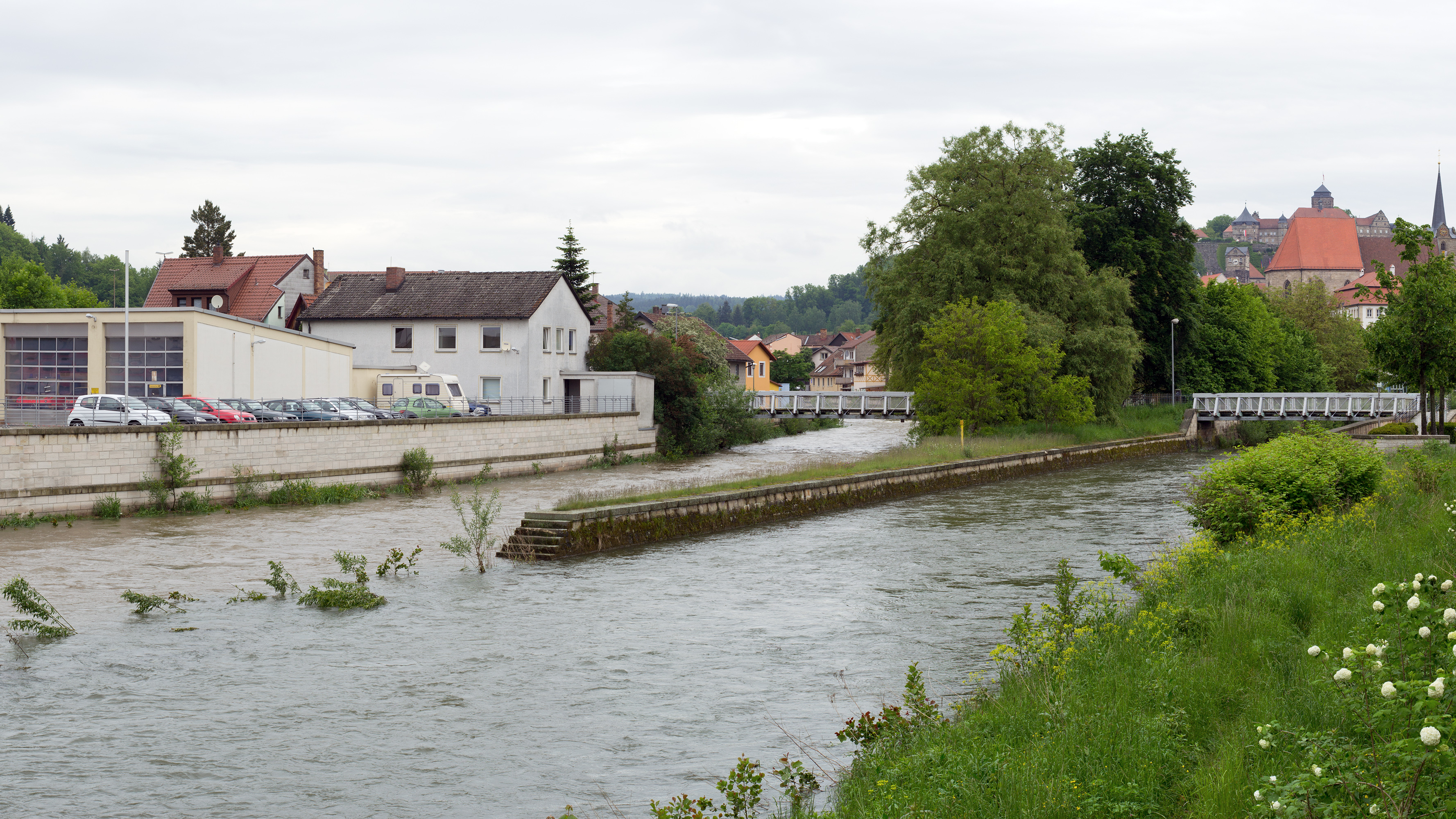 Mündung des Flusses Kronach (rechts) in die Haßlach (links) im Stadtgebiet der oberfränkischen Stadt Kronach. Beide Flüsse führen Hochwasser, das durch die tagelangen Regenfälle verursacht wurde, die zum Hochwasser in Mitteleuropa 2013 führten.